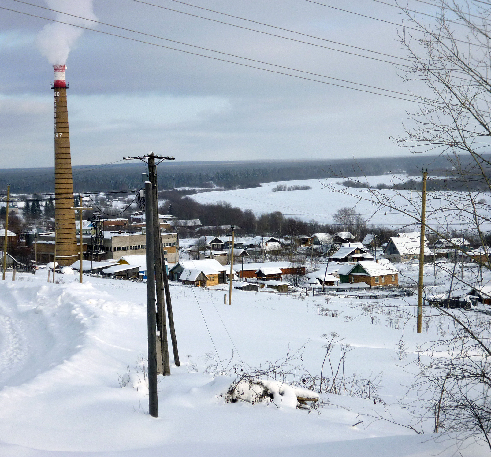 Айкино